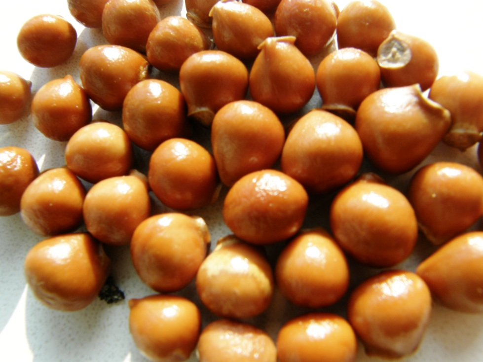 Staphylea pinnata